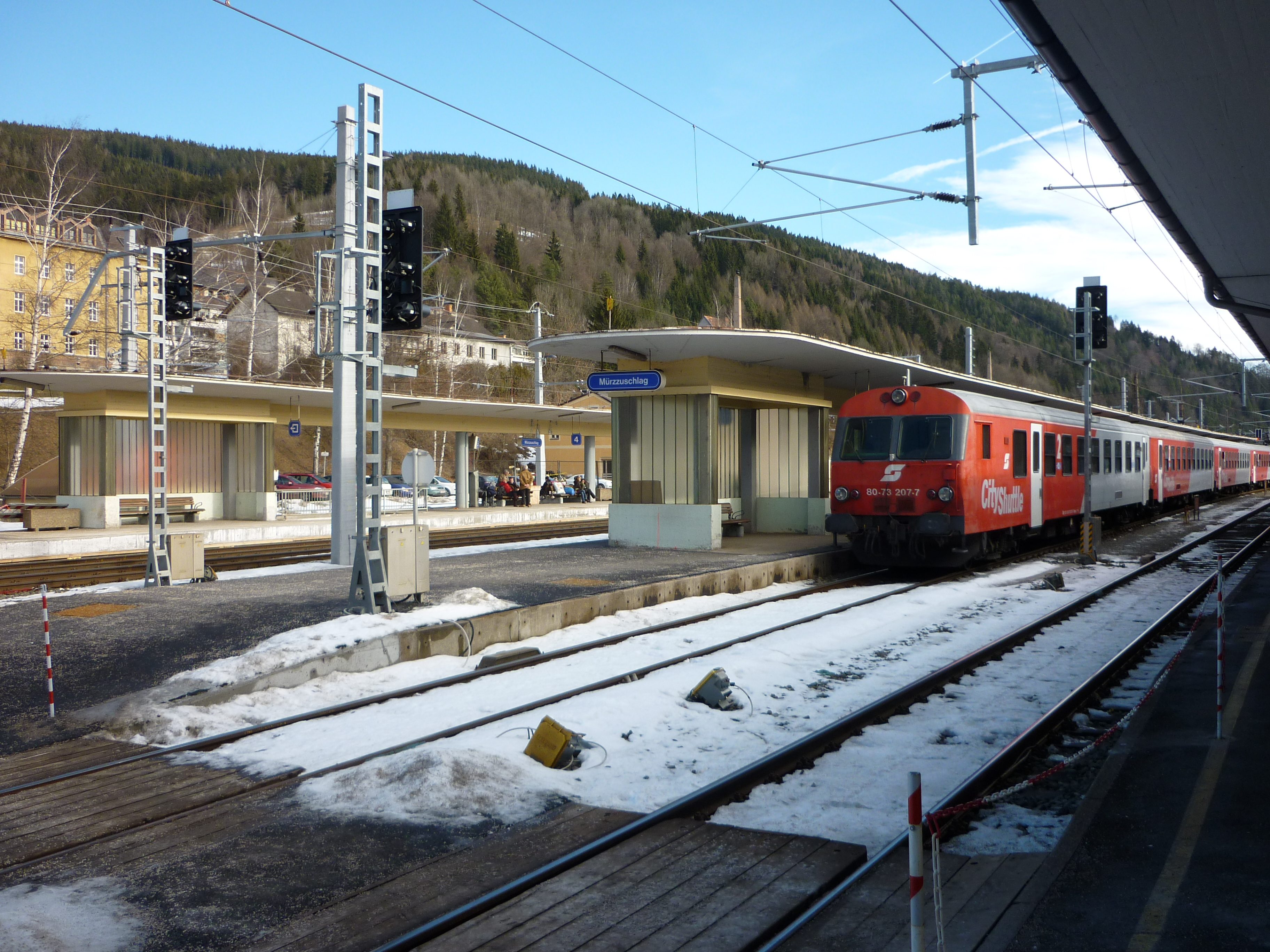 Bhf Mürzzuschlag Bstg 2-3